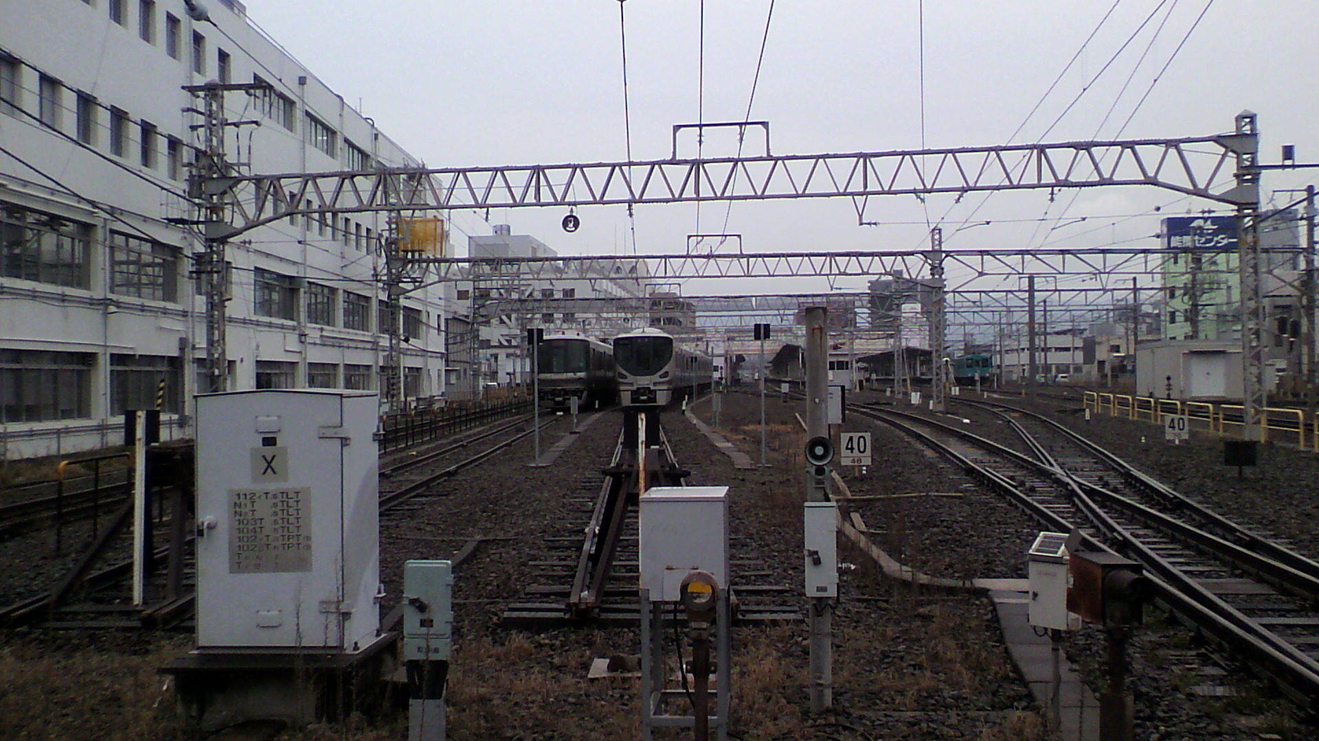 和歌山駅構内